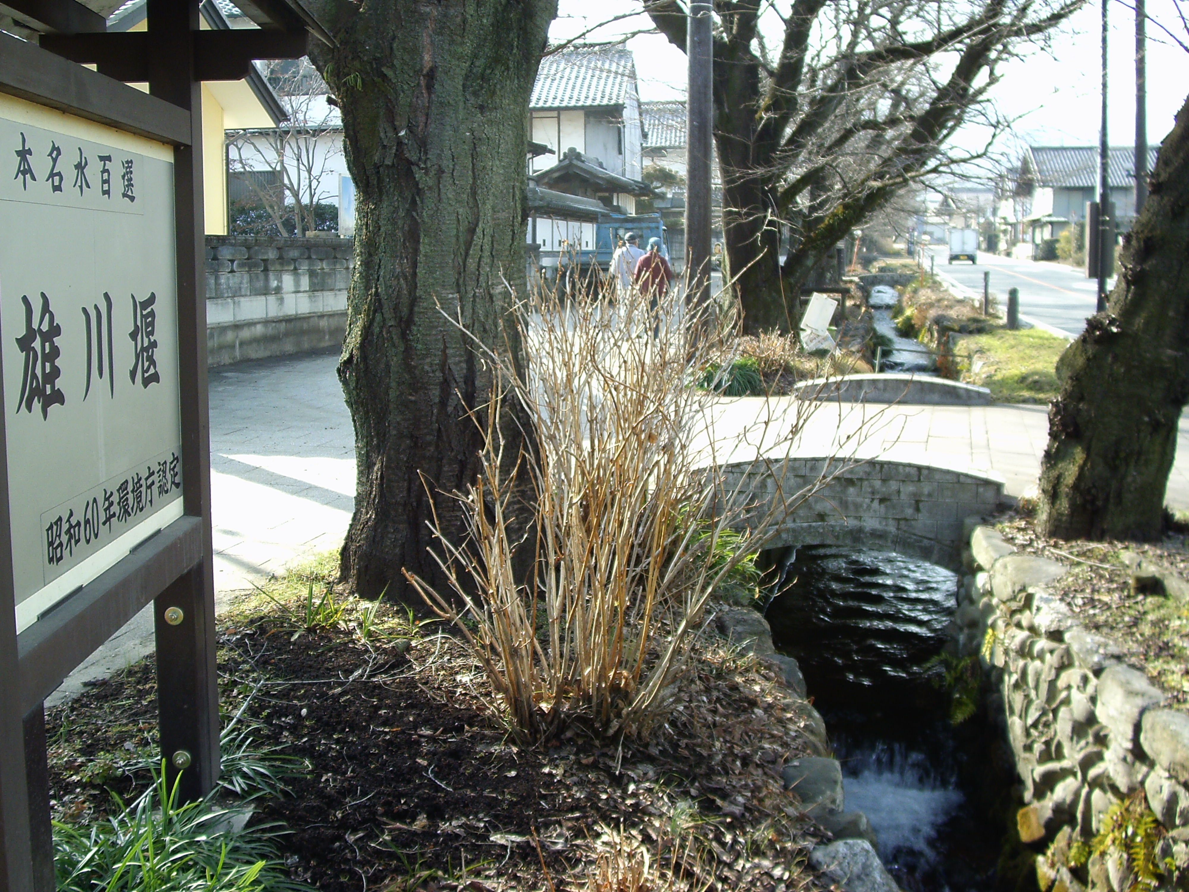 疏水百選・土木遺産・かんがい施設遺産・歴史的風致維持向上地区（歴史まちづくり法）・名水百選選定の雄川堰（群馬県甘楽町）